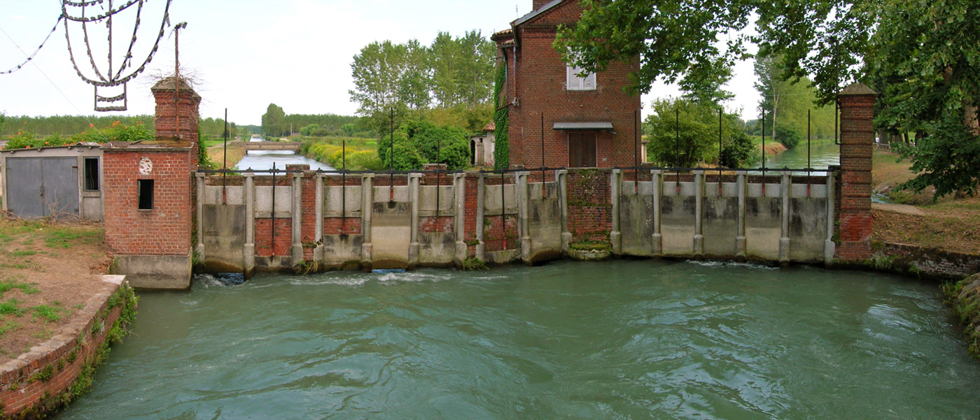 Il Canale Quintino Sella a Cilavegna dove si divide nei subdiramatori "Pavia" e "Mortara".